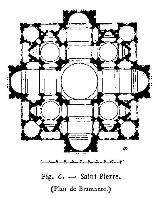 Entwurf Bramantes in Form eines griechischen Kreuzes